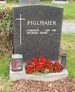 Michael Toost - Hütteldorfer Friedhof (7-10-13)